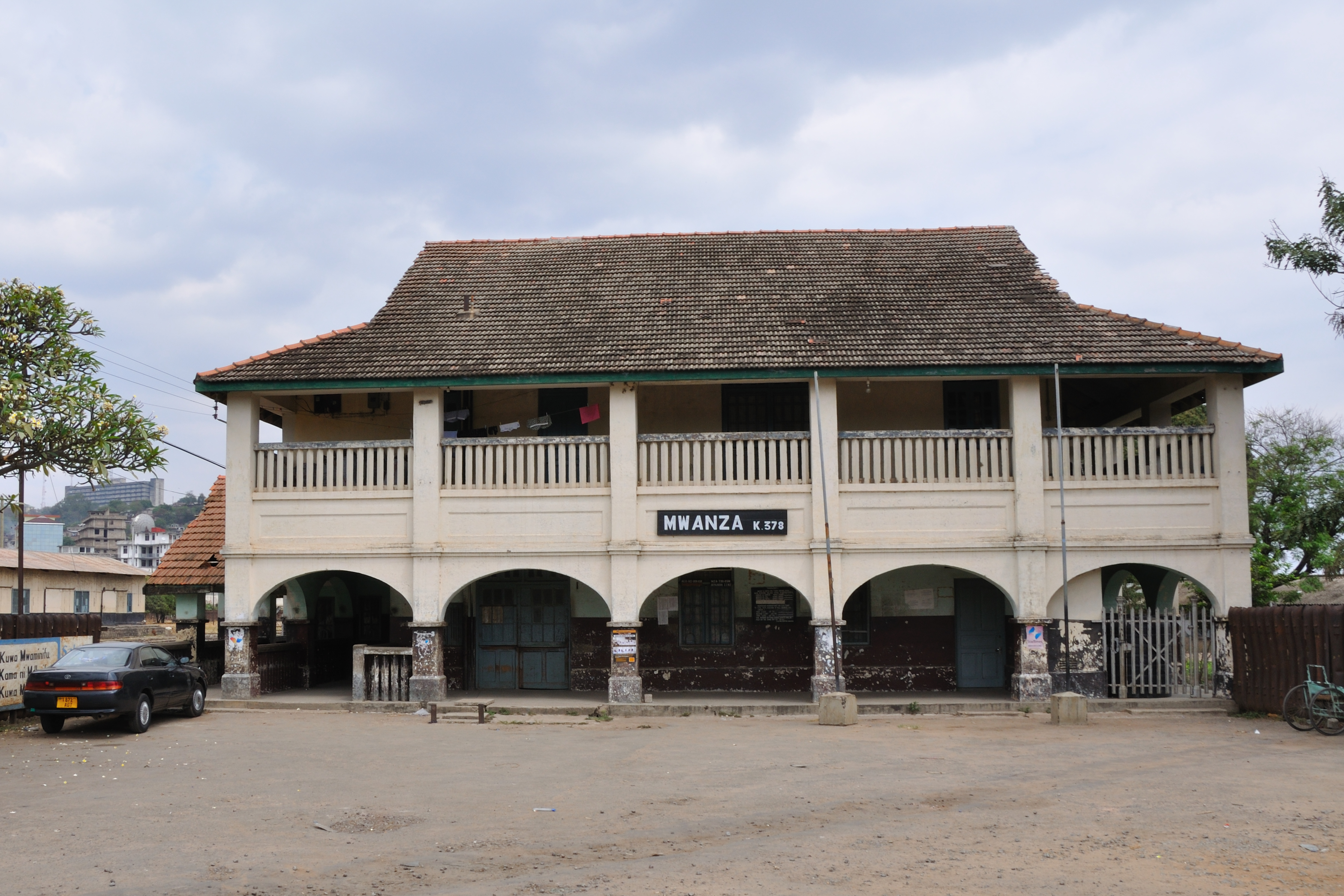 Train station in Mwanza, Tanzania. Tanzania